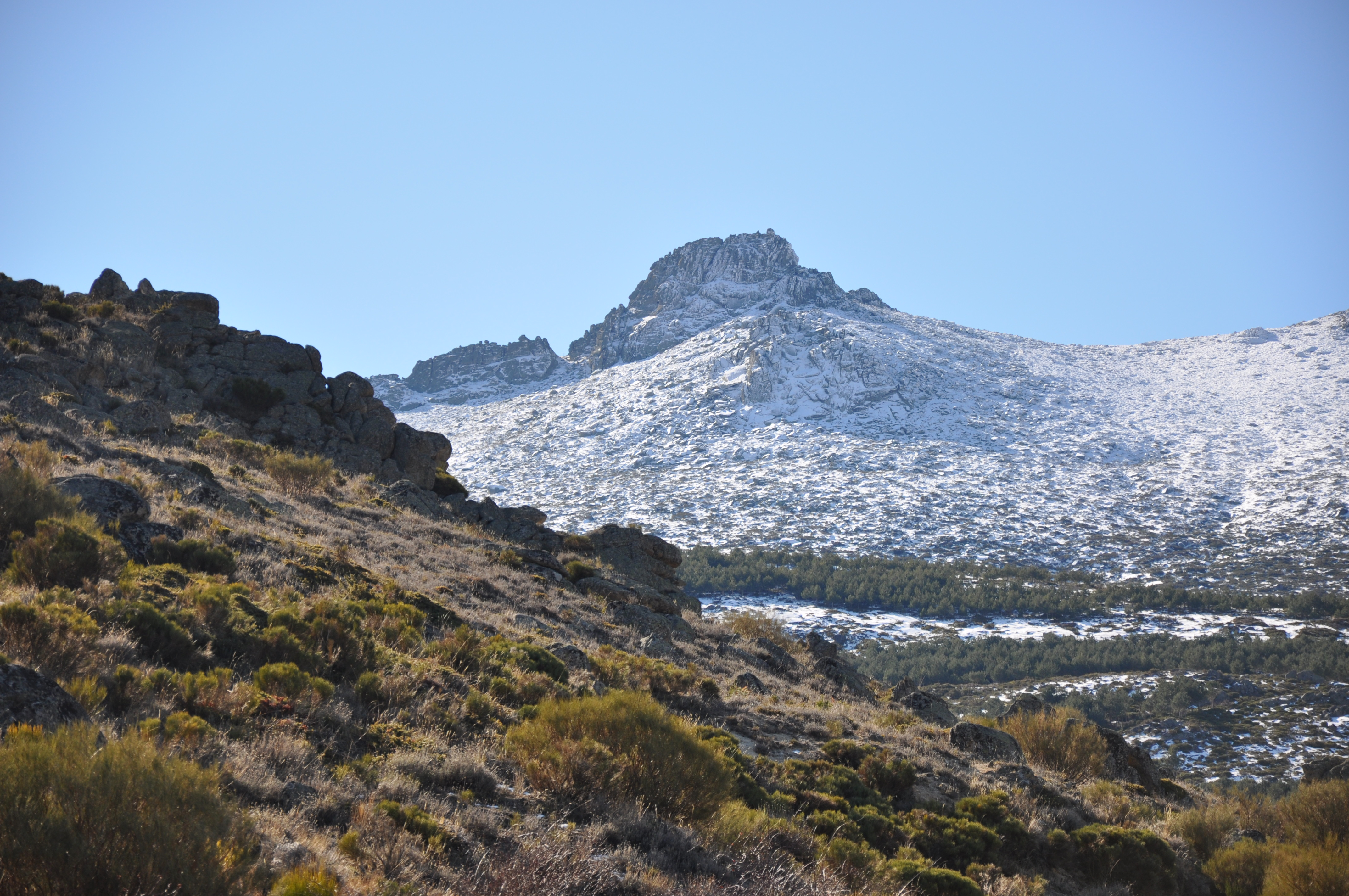 Risco del Sol, (2124 m) Sierra de la Paramera, Sotalbo, (Ávila), España. This is a photography of a Site of Community Importance in Spain with the ID: ES4110034. Natura2000 entry, EEA entry